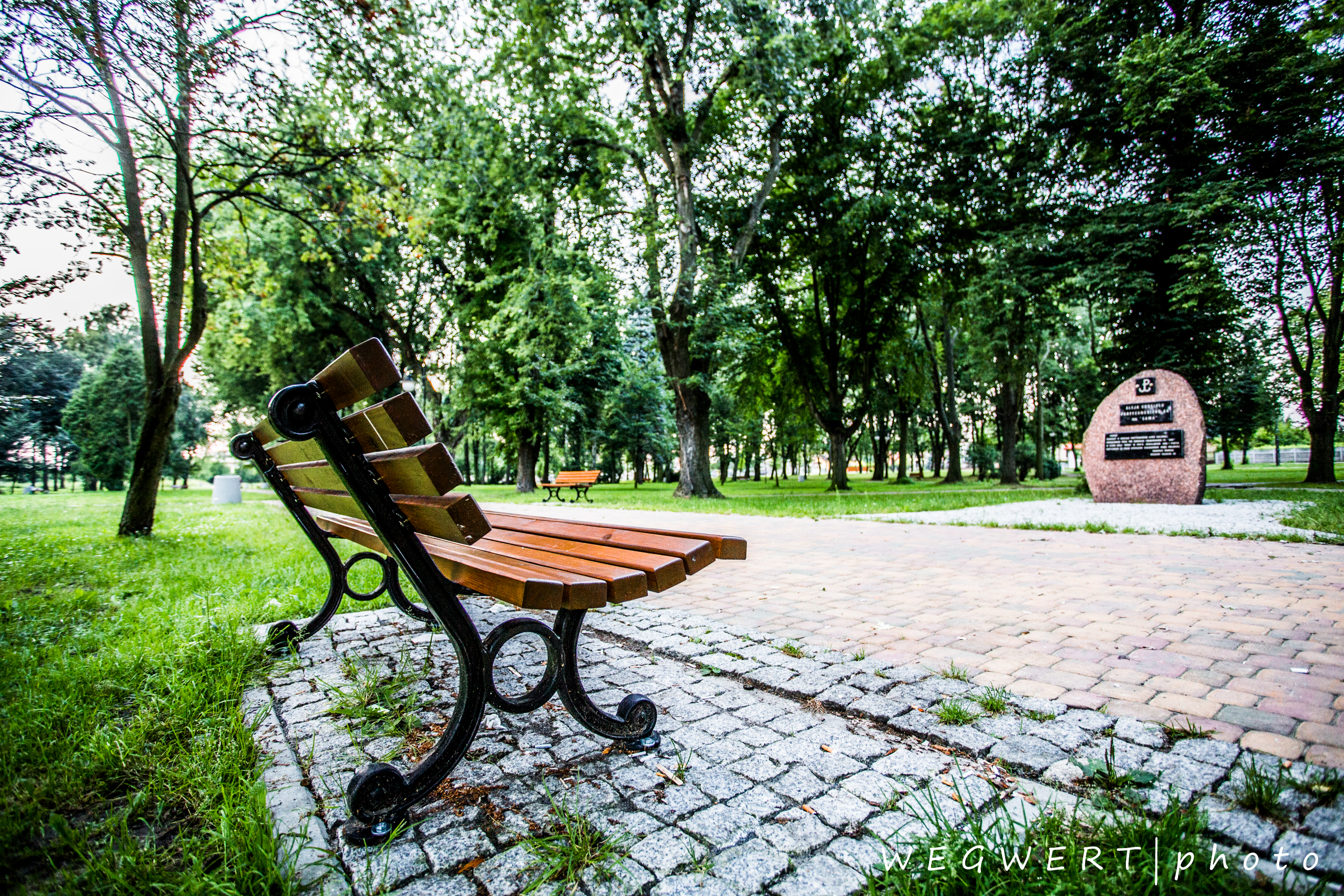 Park Miejski w Koluszkach